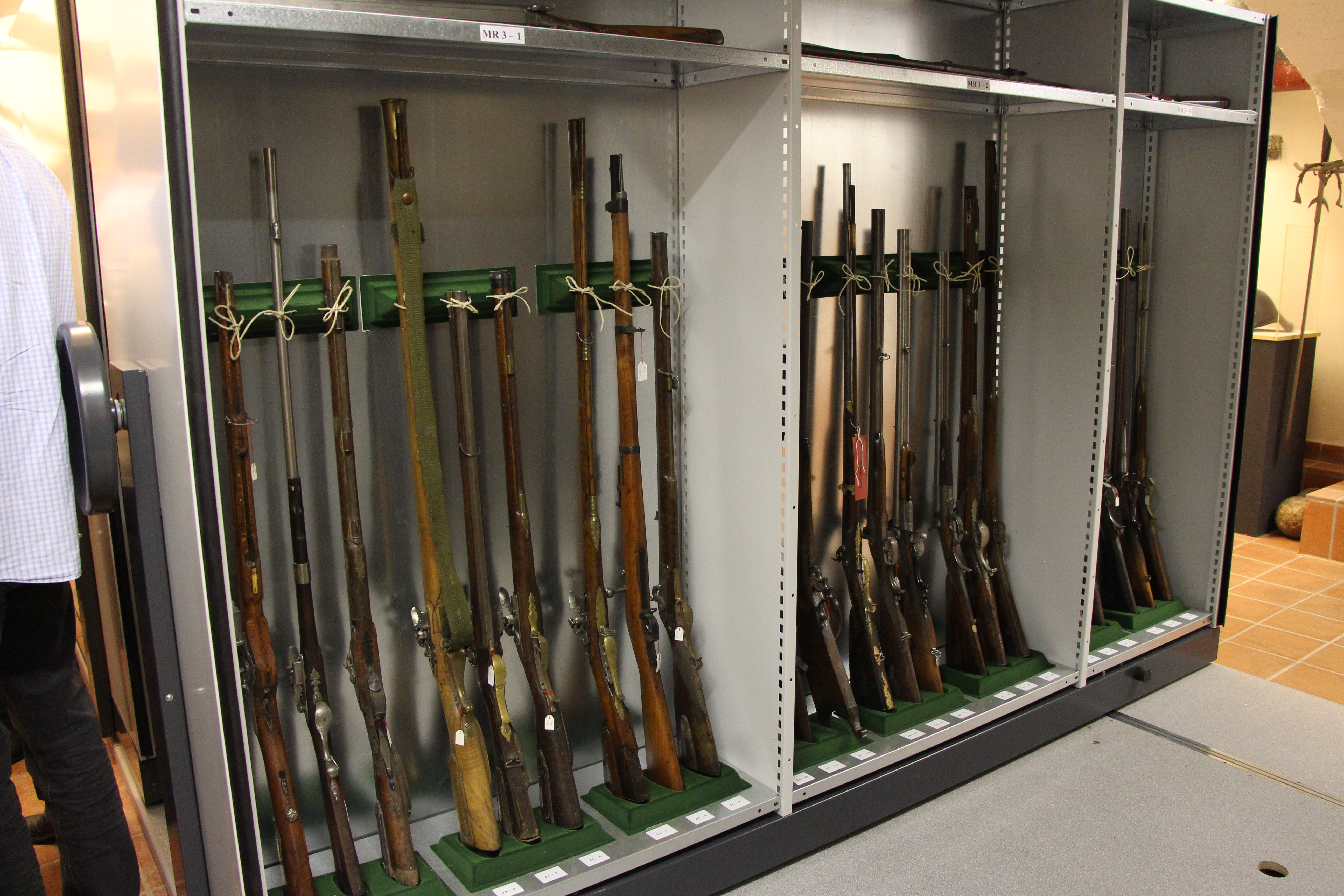 Braunschweigisches Landesmuseum. Wikimedia Deutschland. Juni 2014.